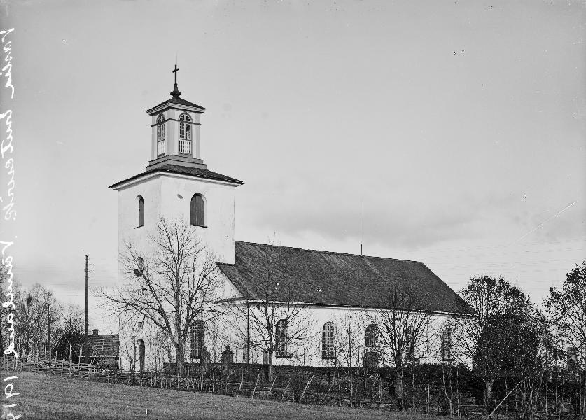 Kyrkan från sydväst. Kategori: (01) ExteriörerKyrkan från sydväst.